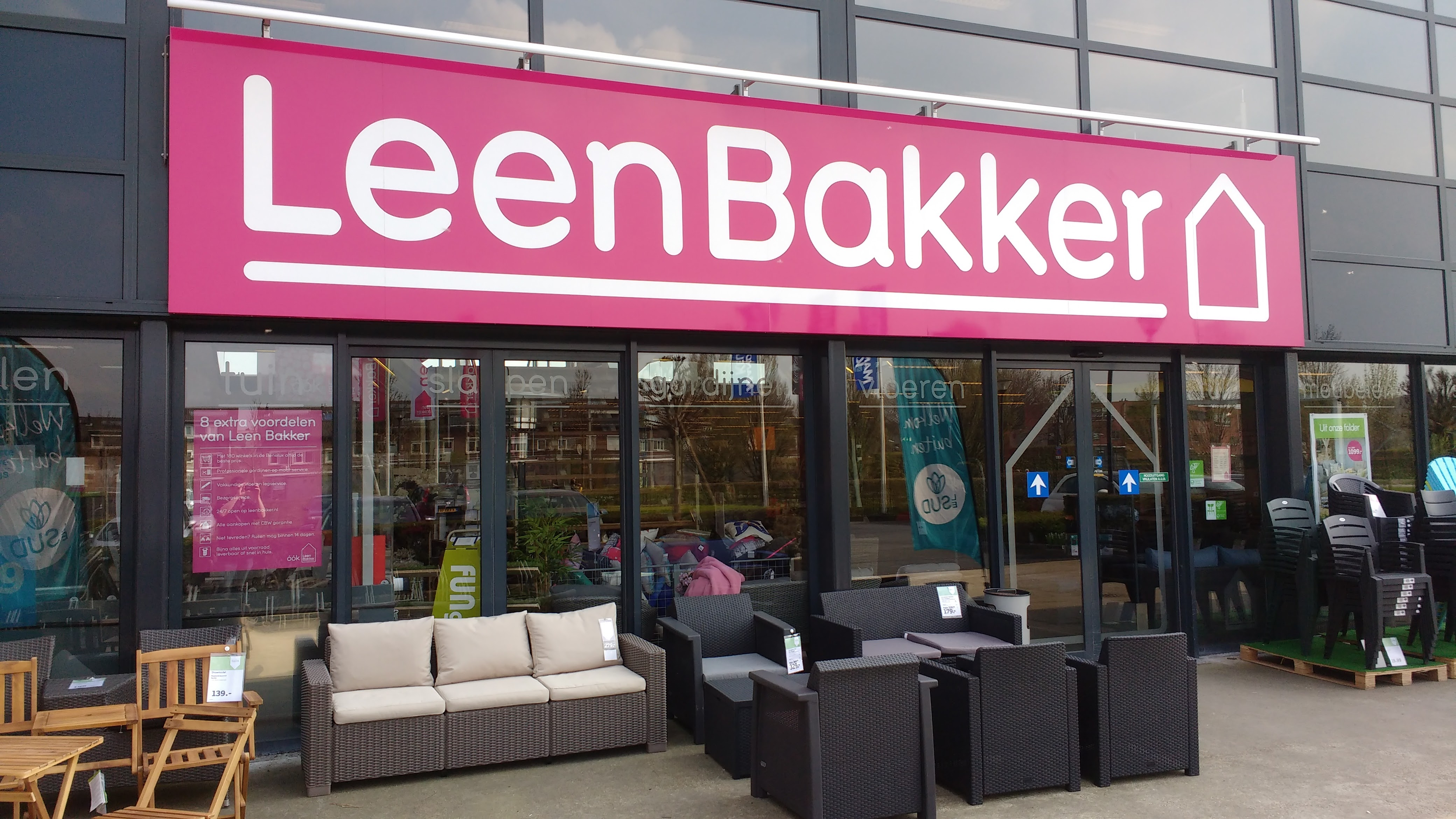 Gebouw Leen Bakker in Woerden